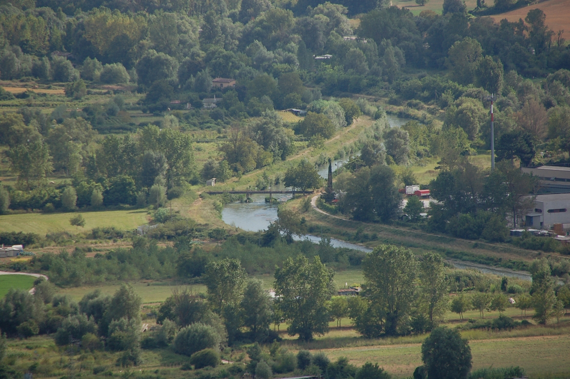 Popoli